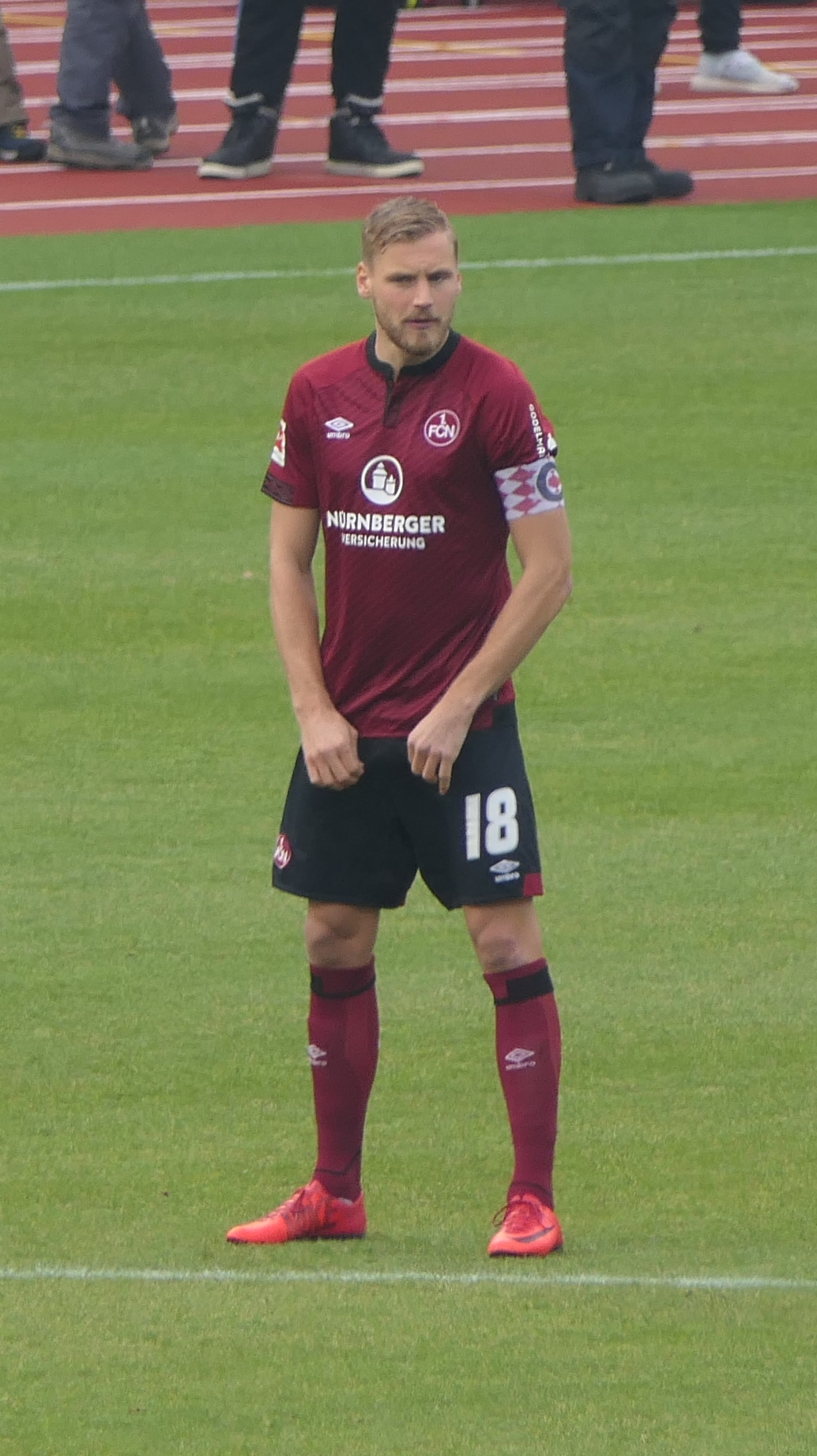 Der Fussballprofi Hanno Behrens vom 1.FC Nürnberg beim Heimspiel gegen Werder Bremen am 02.02.2019.